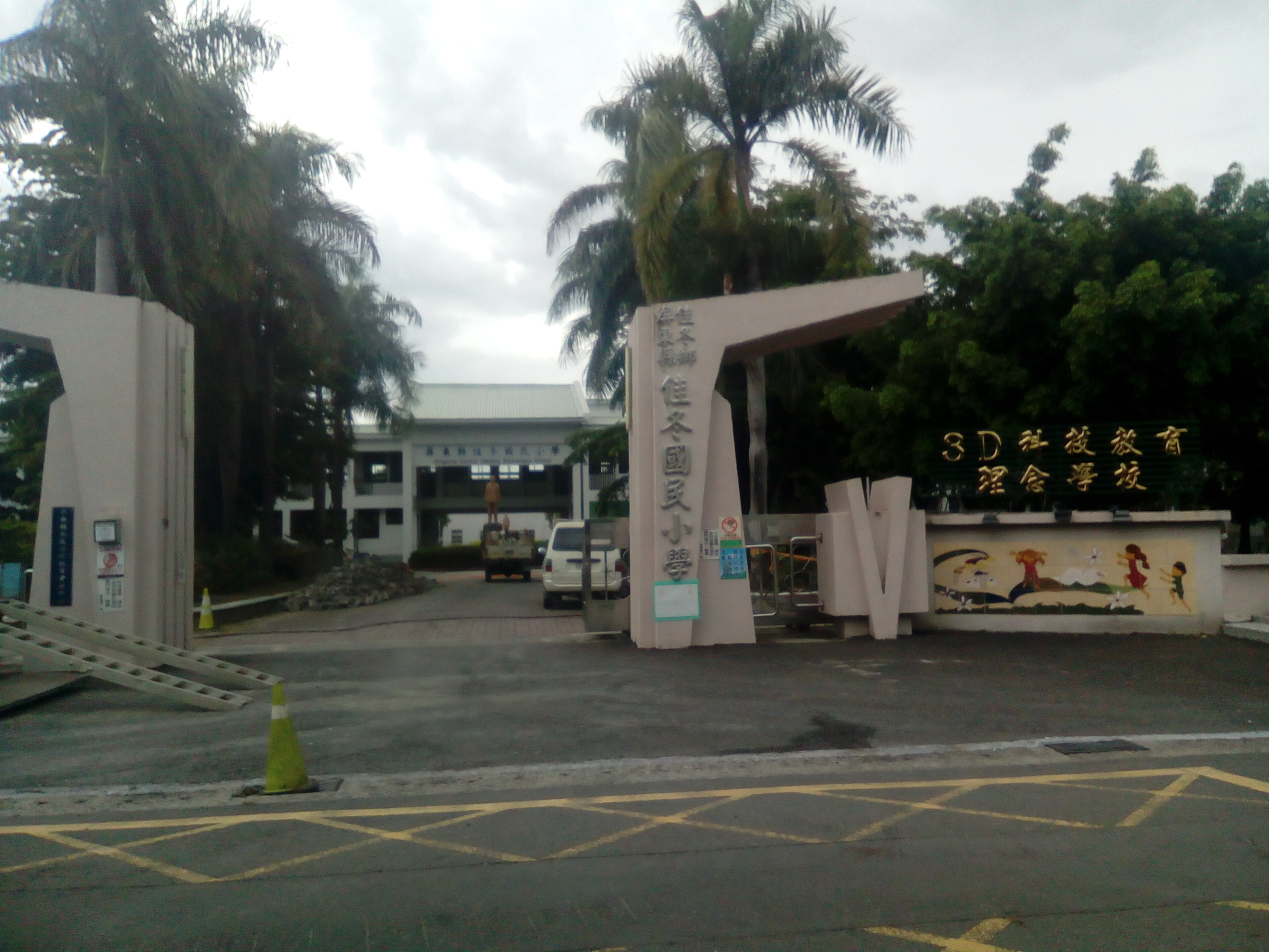 位於市區北側 進學街上